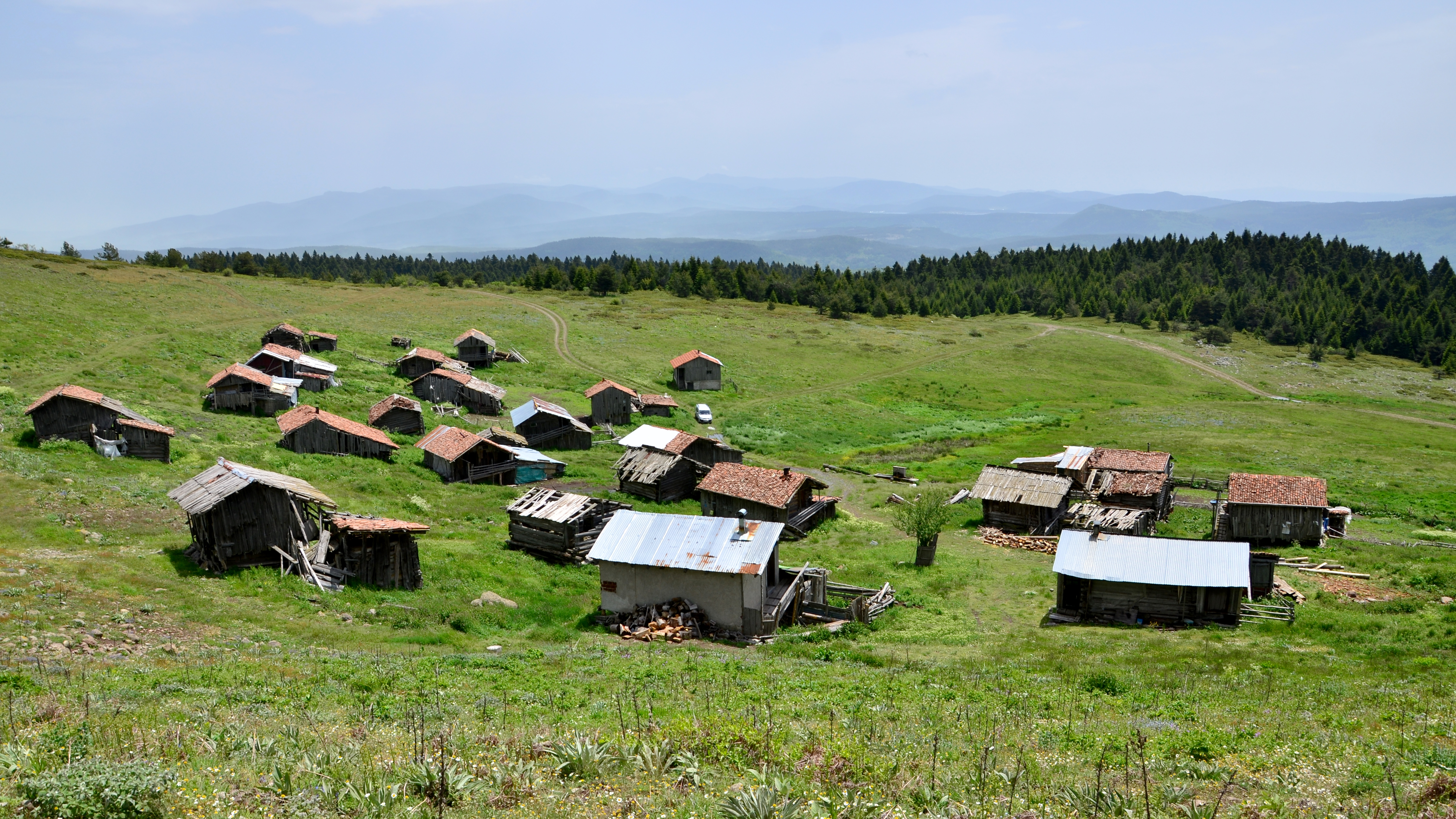 Yayla evleri